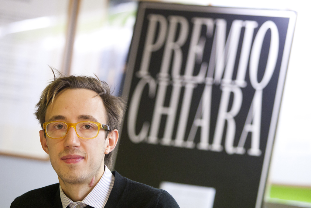 Giacomo Cardaci